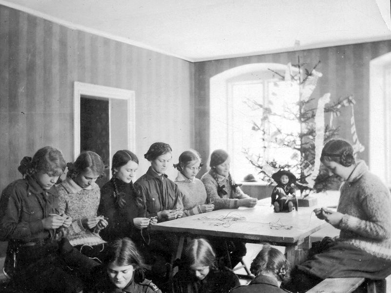 Tagling under förläggning, Wallinum, Säby Gård, Jakobsberg, 1915